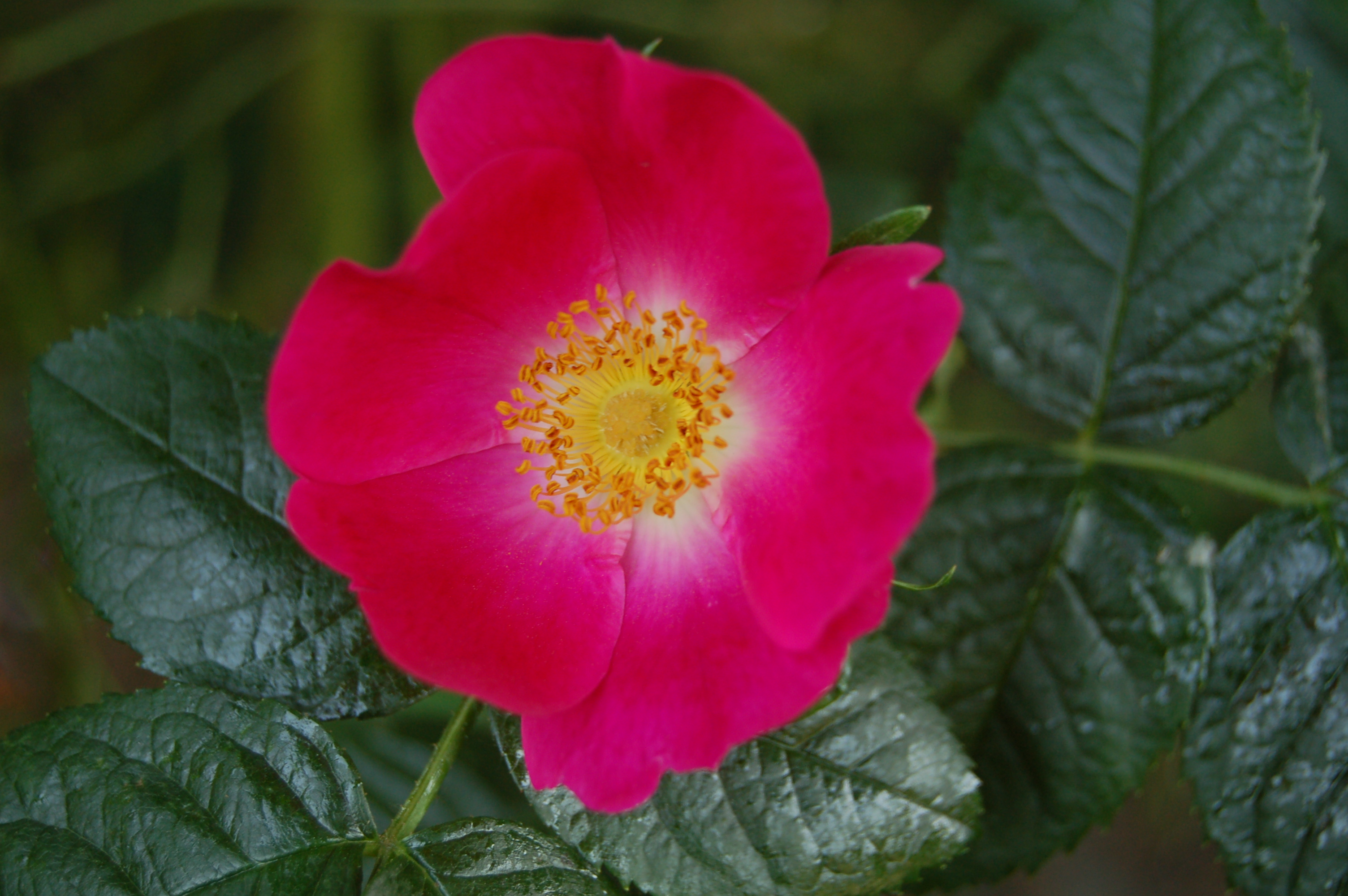 Rosa 'Kiese'